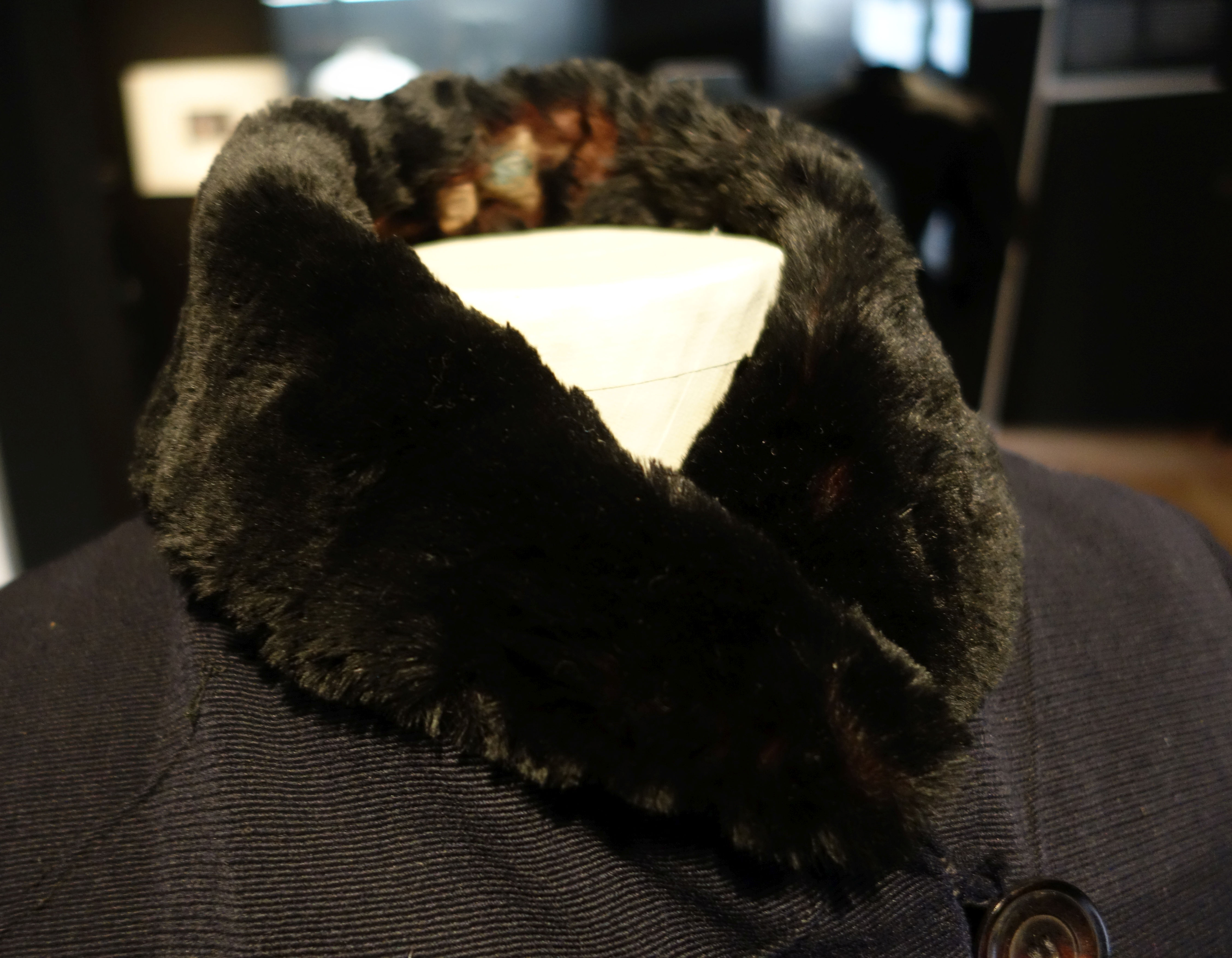 Textilfabrik Cromford in Ratingen, Textilmuseum. Blauer Damenmantel mit Sealkaninkragen, Mitte 1920er Jahre. Originale Beschreibung: Blauer Damenmantel mit Pelzkragen und Schirm. Wollrips, Kunstfaserjacquard (Futter), Pelz, Kunststoffknöpfe. Mitte 1920er Jahre. In den 1920er Jahren waren sogenannte Complets beliebt, d. h. Kleid und Mantel waren aufeinander abgestimmt. Unter einem Mantel ließ sich auch ein abgetragenes Kleid, wie dieses Strickkleid, verbergen. „Das Karnickel ist der Pelz des kleinen Mannes.“ (Richard Lohmann, 1928) „Da gilt es nun, mit viel Geschmack und sorgfältiger Überlegung das herauszufinden, das jeweils dem Zwecke der betreffenden Trägerin durchaus entspricht. Das Kleid, das die Garderobe tatsächlich um ein Stück bereichert, an dem man wirklich etwas hat, so daß es das zu de in unserem Leben auch noch vorkommenden dient.“ (Die Frau 20, 1929)